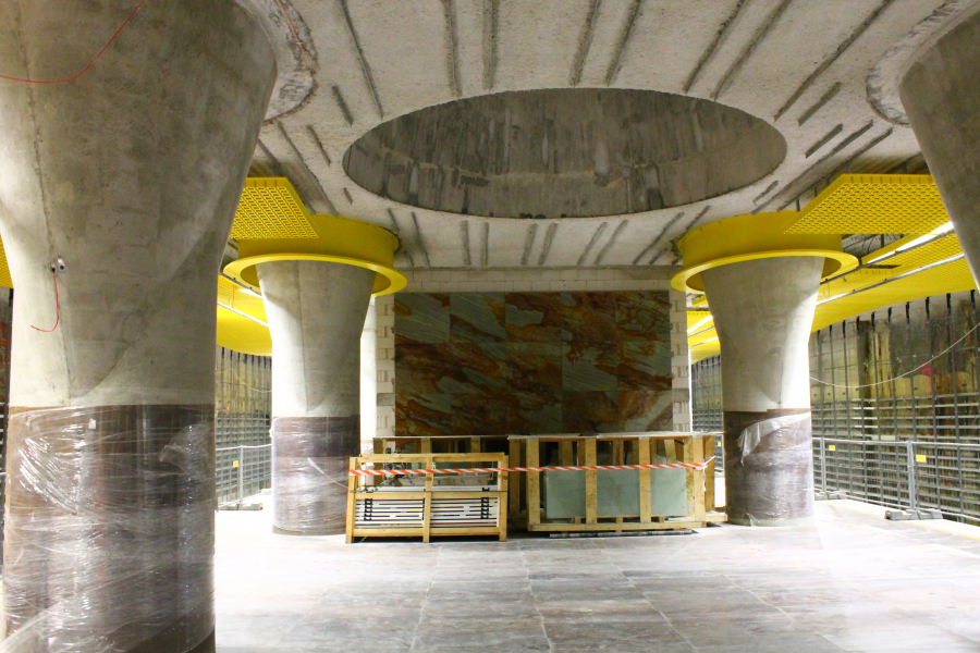 Peron budowanej stacji metra C11 Świętokrzyska.